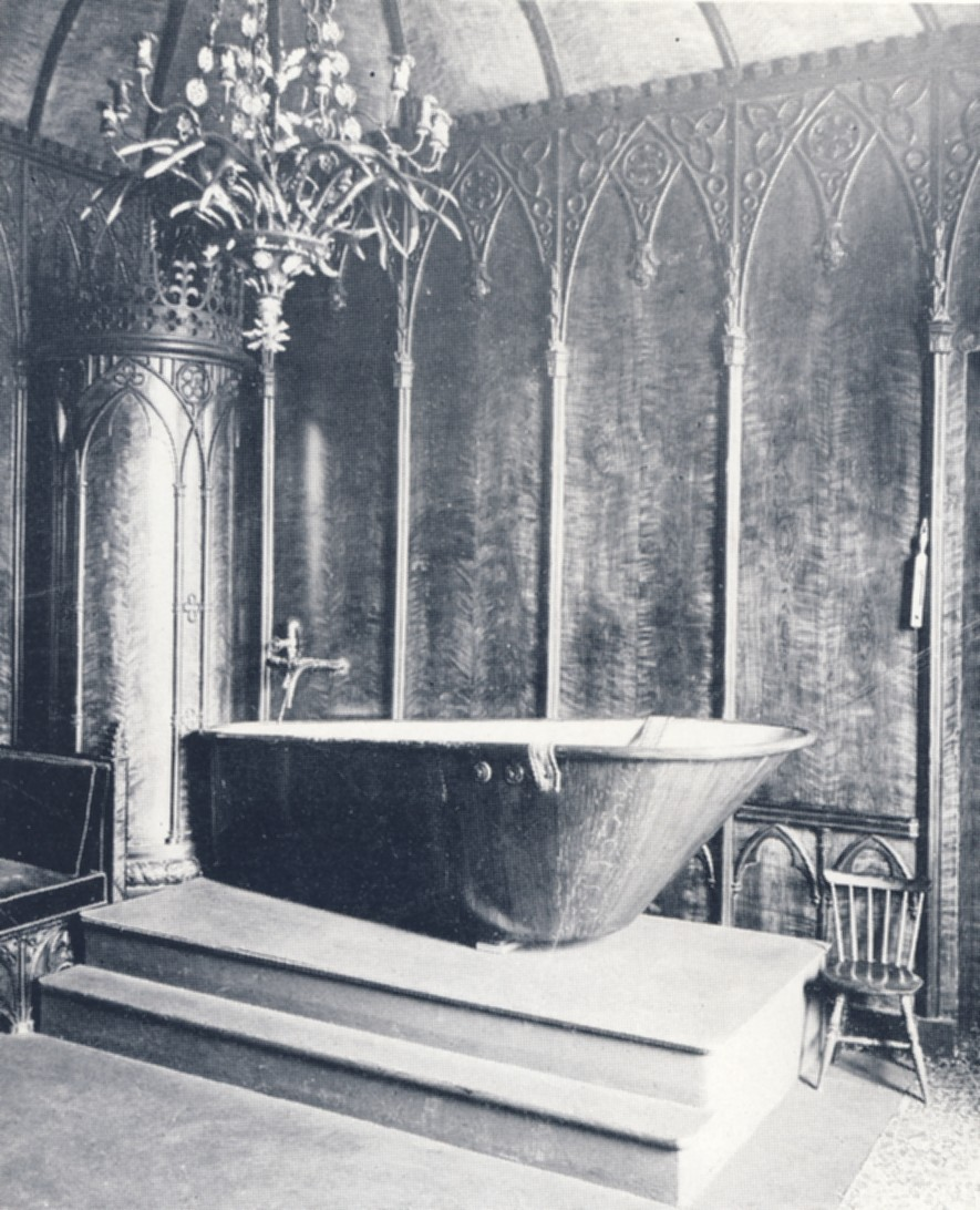 Oakar I:s götiska rum på Stockholms slott inredd som badrum för kronprins Gustav (V) 1897